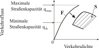 Maximale und minimale Straßenkapazitäten in Kerner’scher Drei-Phasen-Verkehrstheorie